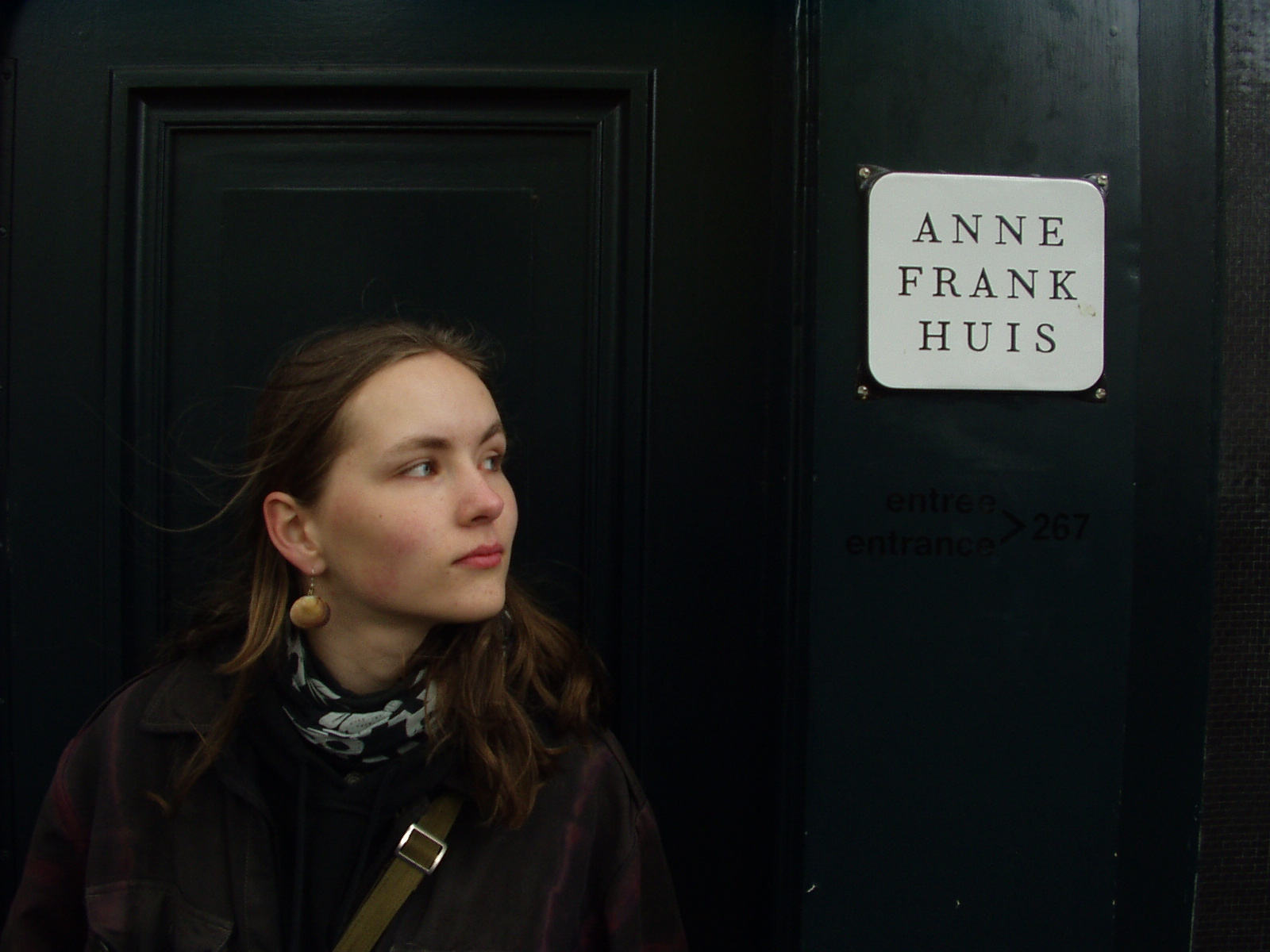 Anne-Frank-Haus in Amsterdam